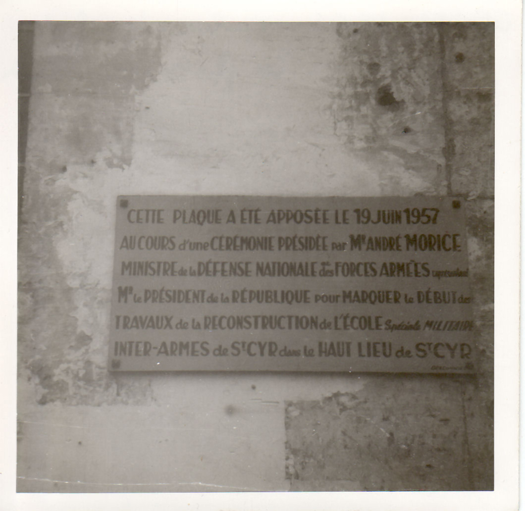 Reconstruction de l'École Spéciale Militaire Interarmes à Saint-Cyr L'École. Cette plaque a été photographiée cour Rivoli sur le bâtiment restauré. Ont peut lire « CETTE PLAQUE A ÉTÉ APPOSÉE LE 19 JUIN 1957 AU COURS d'une CÉRÉMONIE PRÉSIDÉE par M. ANDRÉ MAURICE MINISTRE de la DÉFENSE NATIONALE et des FORCES ARMÉES représentant M. le PRÉSIDENT de la RÉPUBLIQUE pour MARQUER le DÉBUT des TRAVAUX de la RECONSTRUCTION de l'ÉCOLE Spéciale Militaire INTER-ARMES de St-CYR dans le HAUT LIEU de St-CYR ». Dans ma mémoire, cette plaque était en bois peint. La qualité est médiocre mais cette photographie a été faite avec un Agfa Isola I alors que j'ai 14 ans.